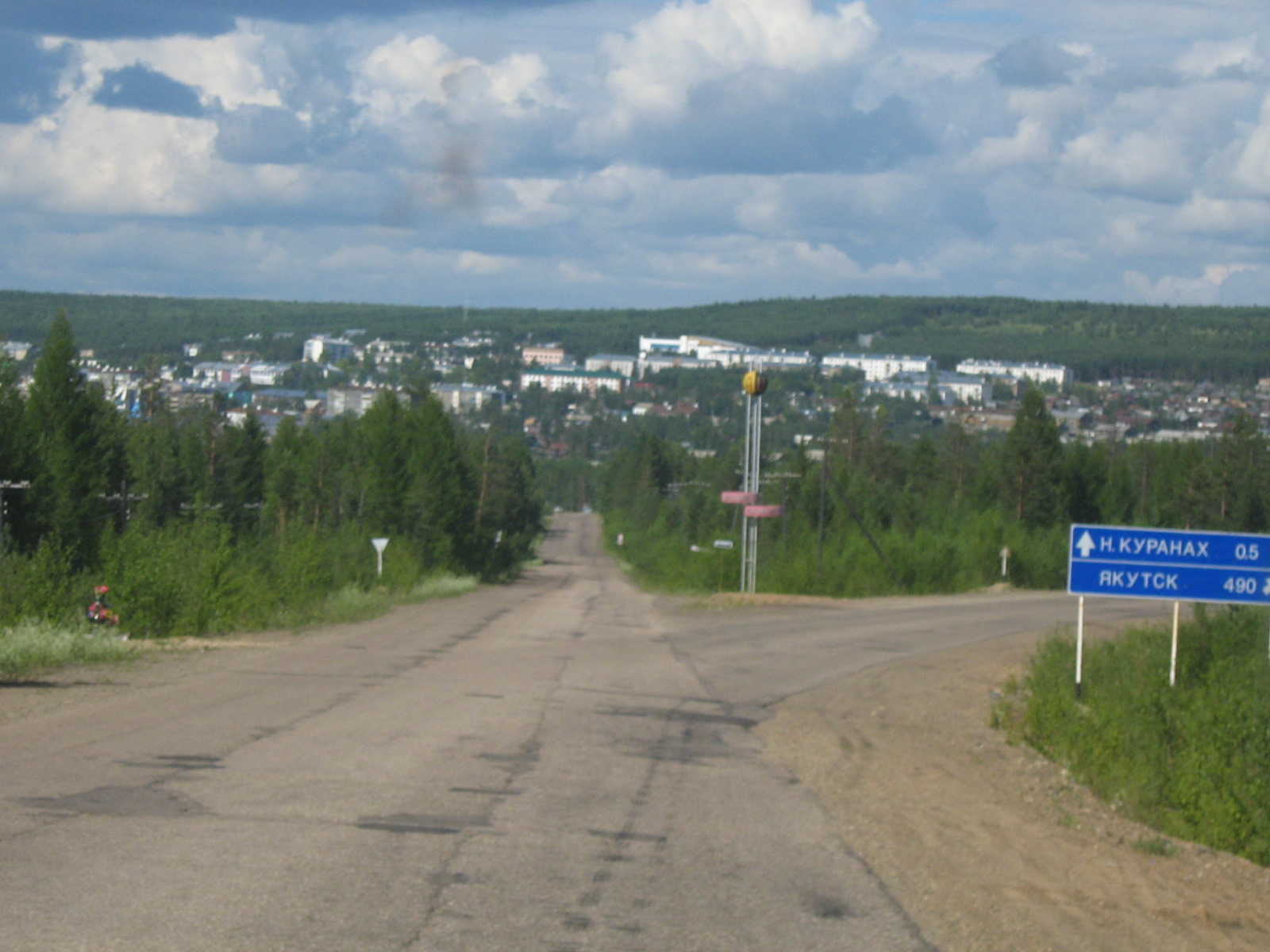 вид на Нижний Куранах с дороги